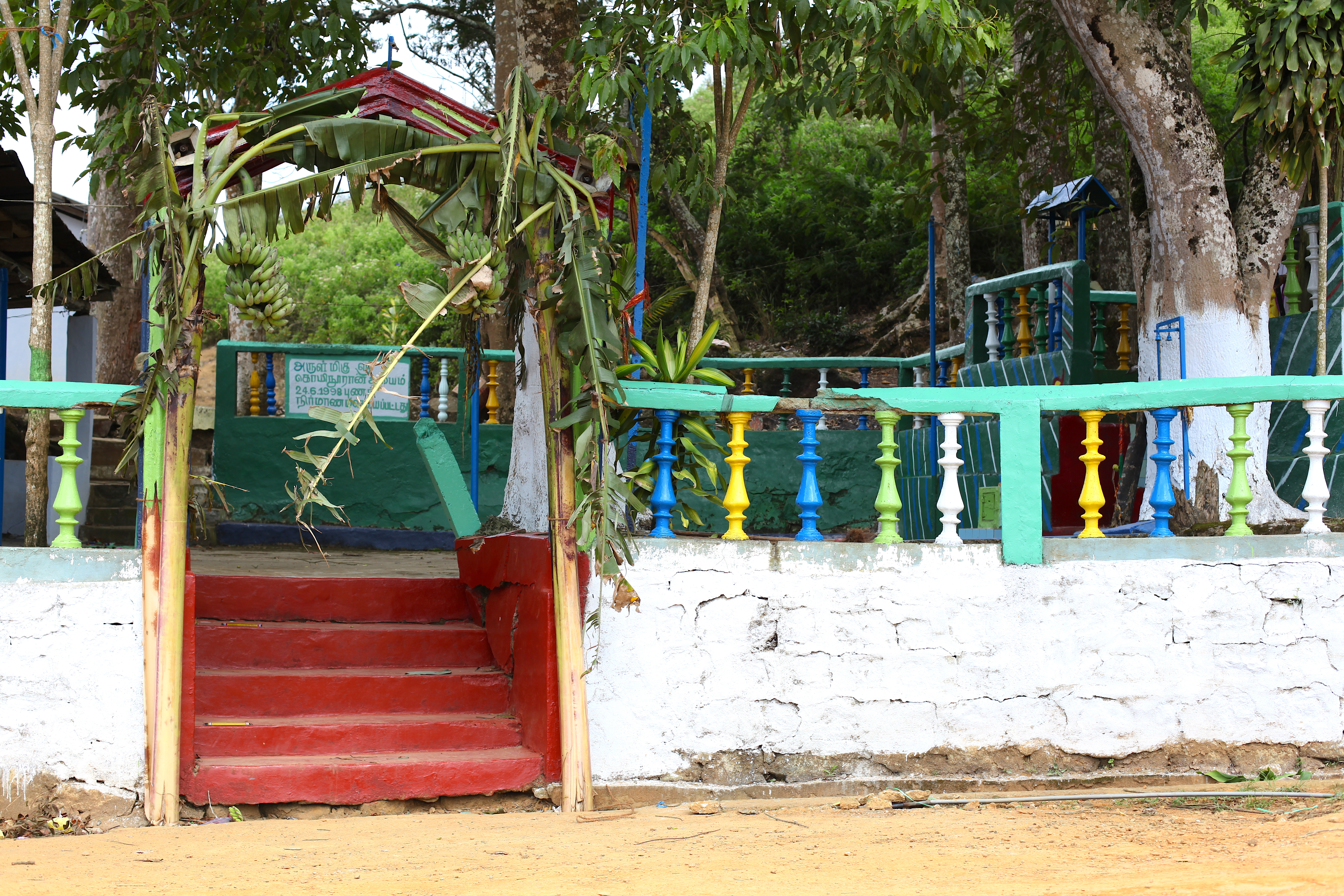 குயினூரான் கோவில் முகப்பு